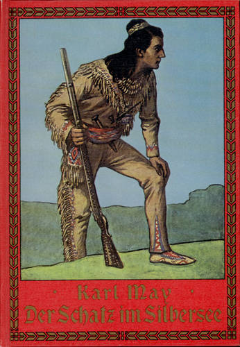 Deckelillustration von Ewald Thiel für die erste Buchausgabe des Schatz im Silbersee von Karl May (erschienen im Oktober 1894 in der Union Deutsche Verlagsgesellschaft